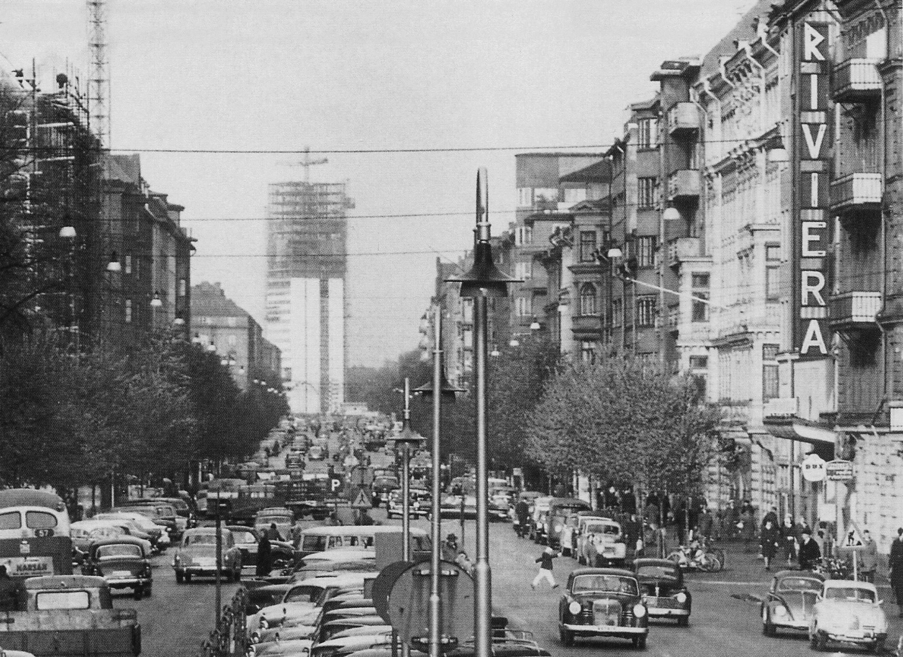 Sveavägen norrut med biografen Riviera till höger och Wennergren-Center under uppförande i bakgrunden